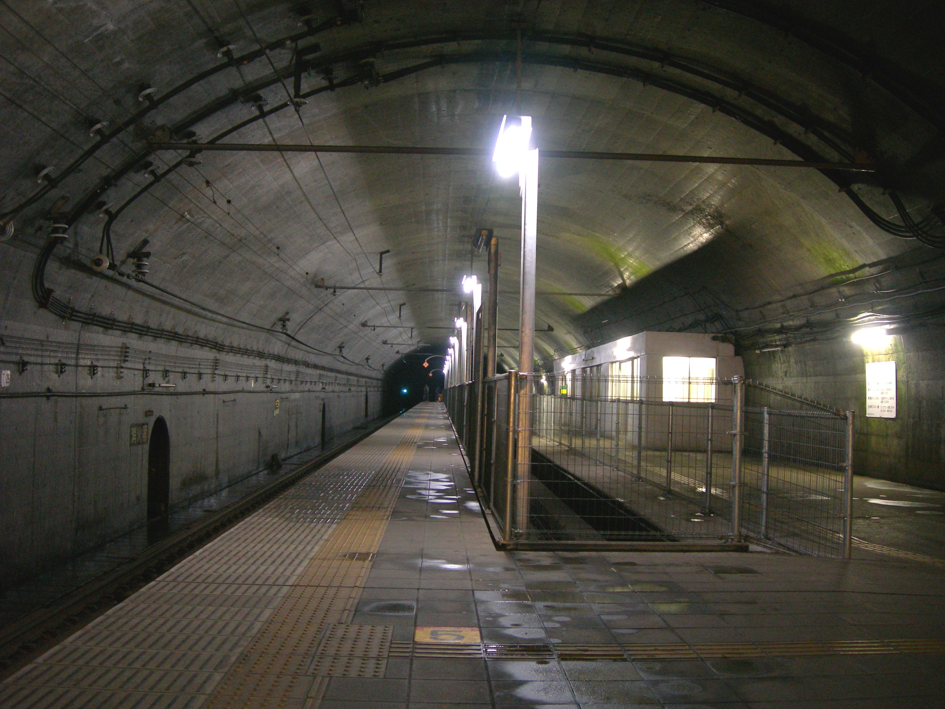 土合駅（下り・地下ホーム）長岡方面